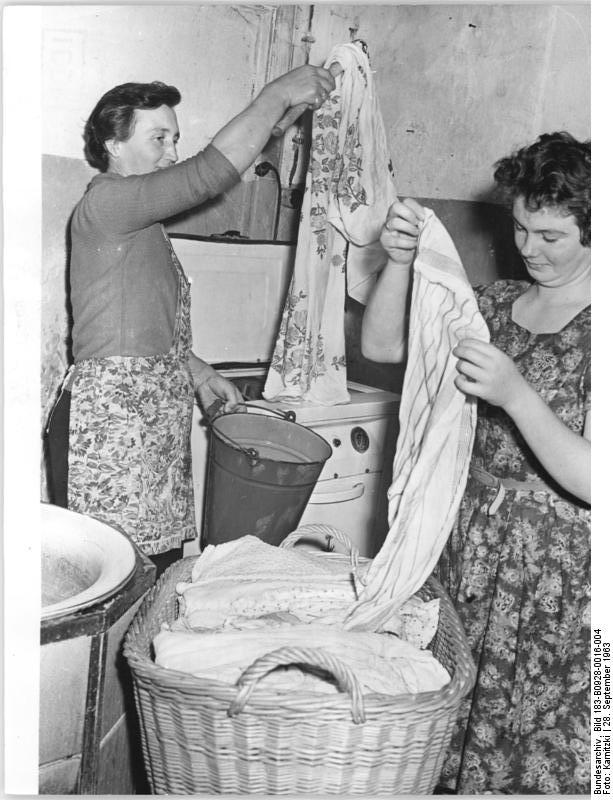 LPG Redebas, Blick in die Wäscherei Zentralbild Karnitzki 28.9.1963 Genossenschaftsbäuerinnen arbeiten und regieren mit in der LPG Redebas Von 135 Genossenschaftsbäuerinnen der LPG "Junge Welt" (Typ III) in Redebas, Kreis Ribnitz-Damgarten, sind z.Zt. 36 in der Viehwirtschaft tätig. Diese Bäuerinnen haben u.a. maßgeblichen anteil an der Überfüllung des Milchplanes der Genossenschaft. 5 Frauen sind Mitglieder des Gemeinderates und 3 Mitglieder des LPG-Vorstandes. Auch die Komissionen für Sozial- und Wohnungswesen sowie für Kultur- und Jugendfragen werden von Frauen geleitet, aktiv ist auch der Frauenausschuß der LPG tätig. Die monatlichen Frauenversammlungen gehören zu den am besten besuchten Veranstaltungen im Dorf. Wichtige Voraussetzungen für diese wachsende Mitarbeit der Frauen sind die zahlreichen sozialen Einrichtungen, die geschaffen wurden und eine wesentliche Erleichterung der Hausarbeit für die Genossenschaftsbäuerinnen bedeuten, so u.a. ein Kindergarten, ein Waschstützpunkt und eine Betriebsküche. UBz: Die Genossenschaftsbäuerin Else Frisch (links) und Ingrid Heim beim Waschen ihrer Wäsche im Waschstützpunkt.